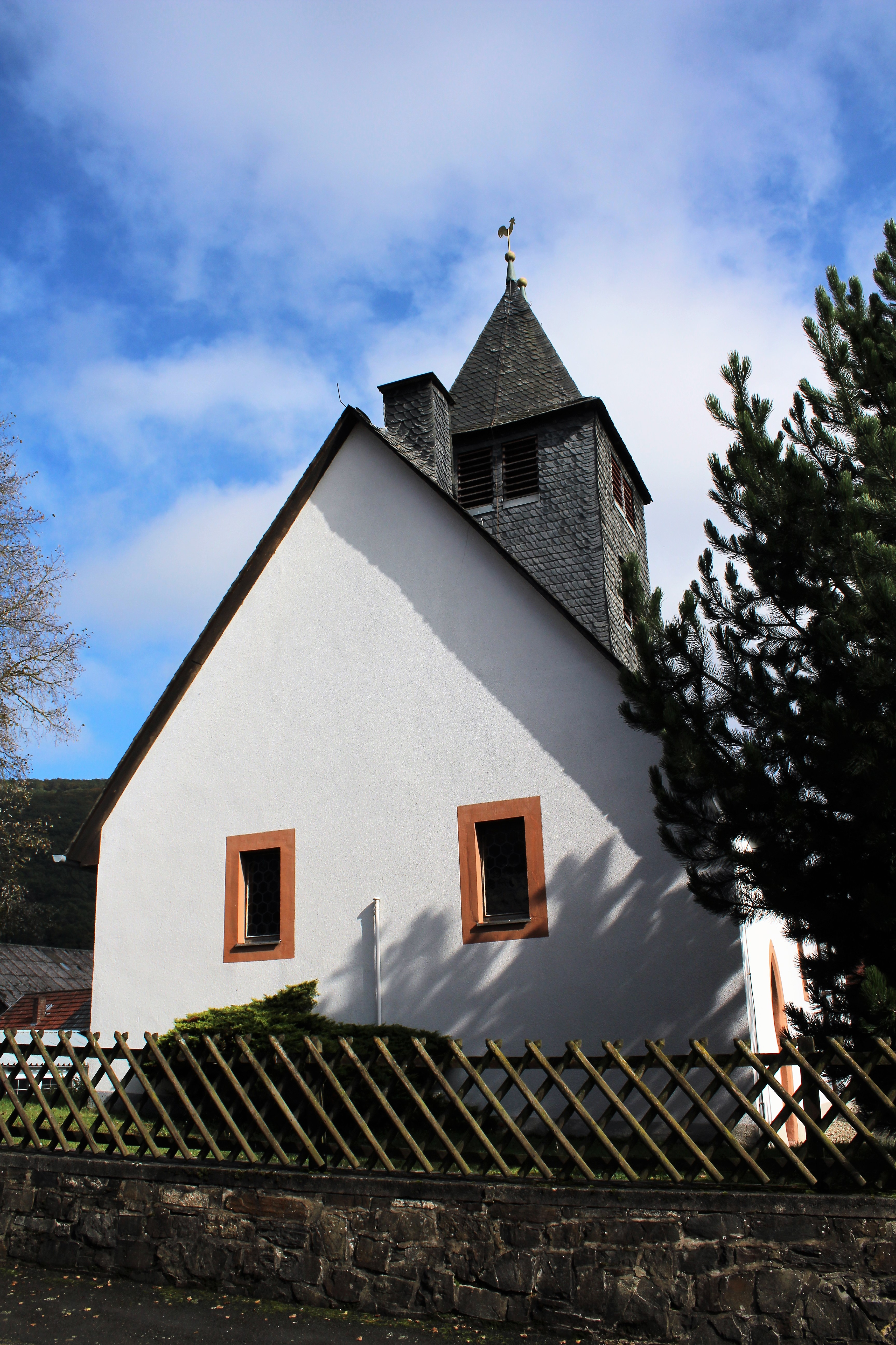 Evanglische Kirche Rodenhausen, Gemeinde Lohra, Landkreis Marburg-Biedenkopf, Hessen, Deutschland